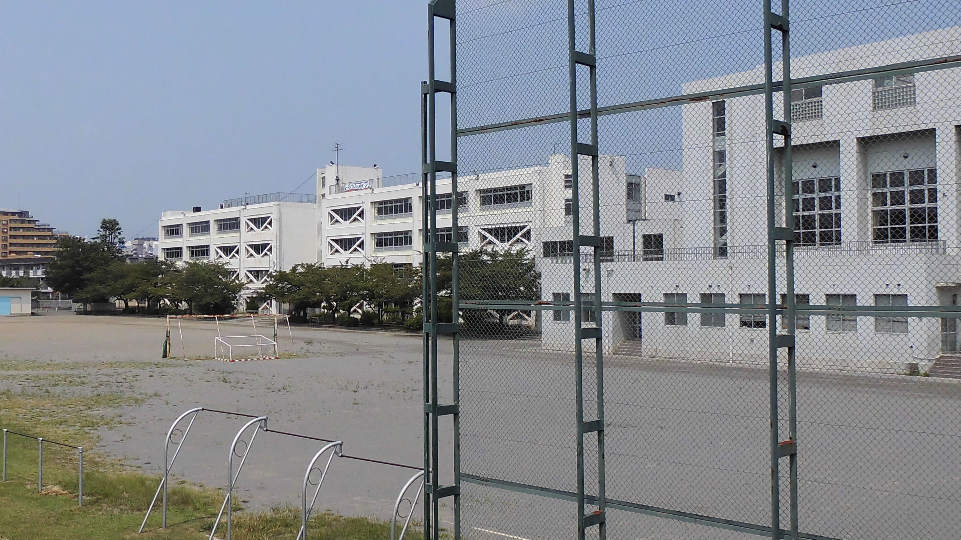 多摩市立多摩中学校130812